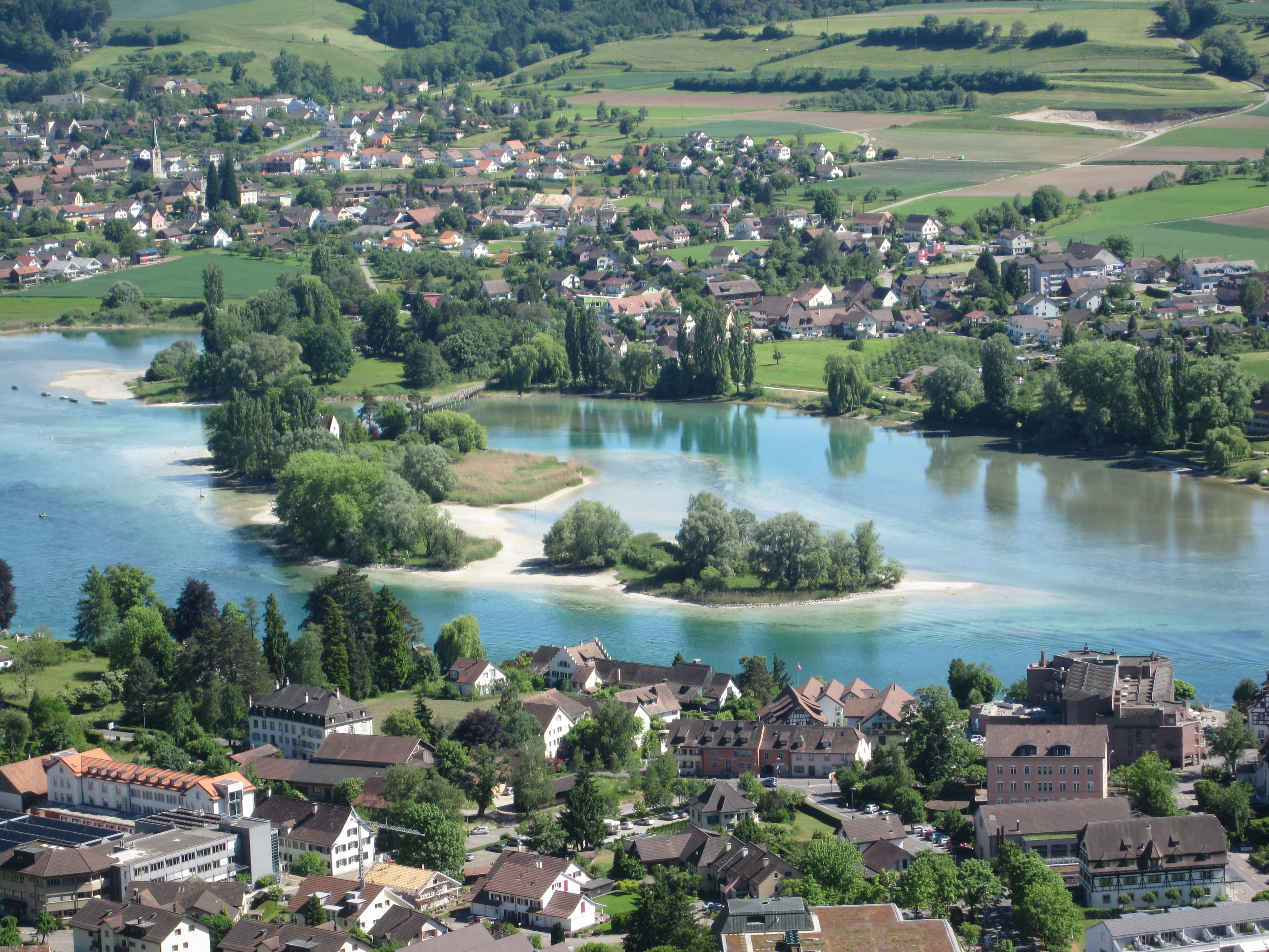 Werd (Bodensee) bei Stein am Rhein